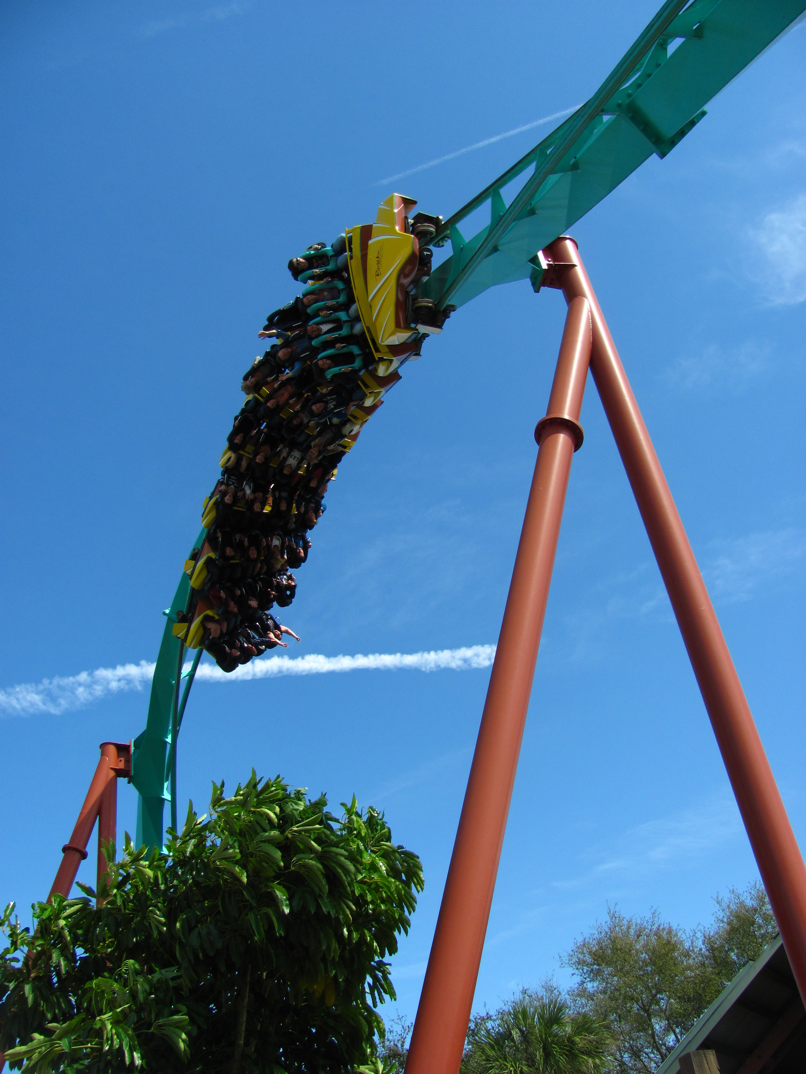 Kumba